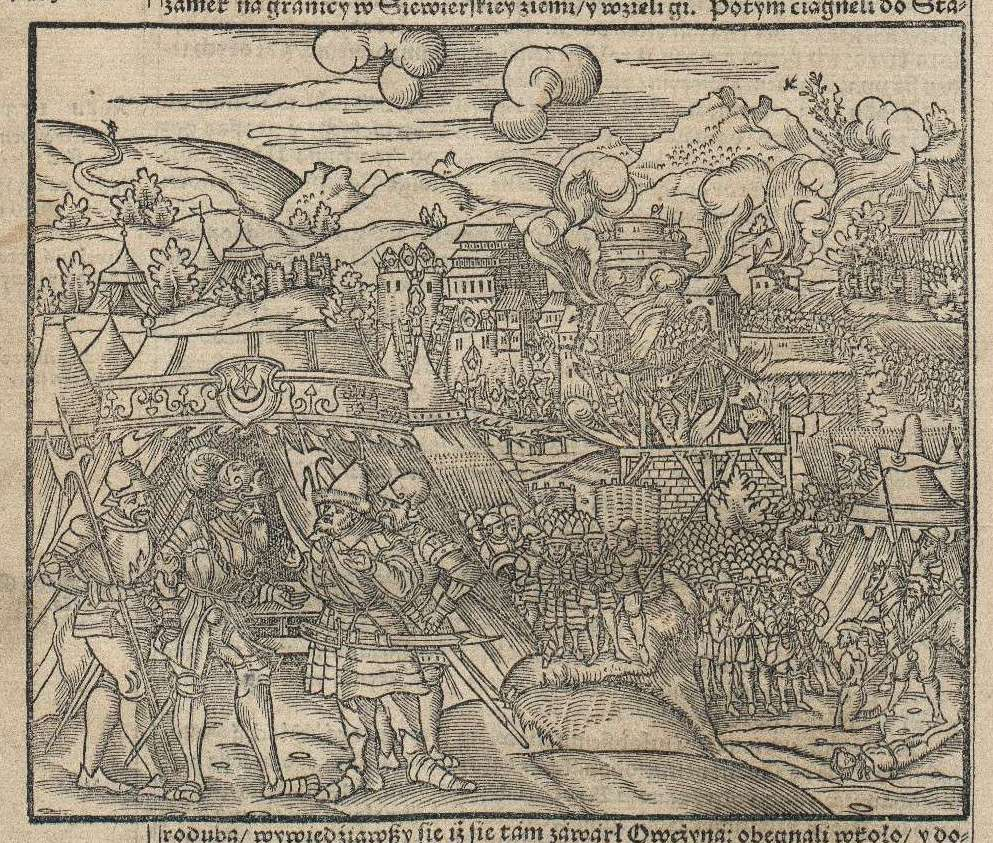 Беларуская (тарашкевіца): Старадуб (Staradub). Аблога